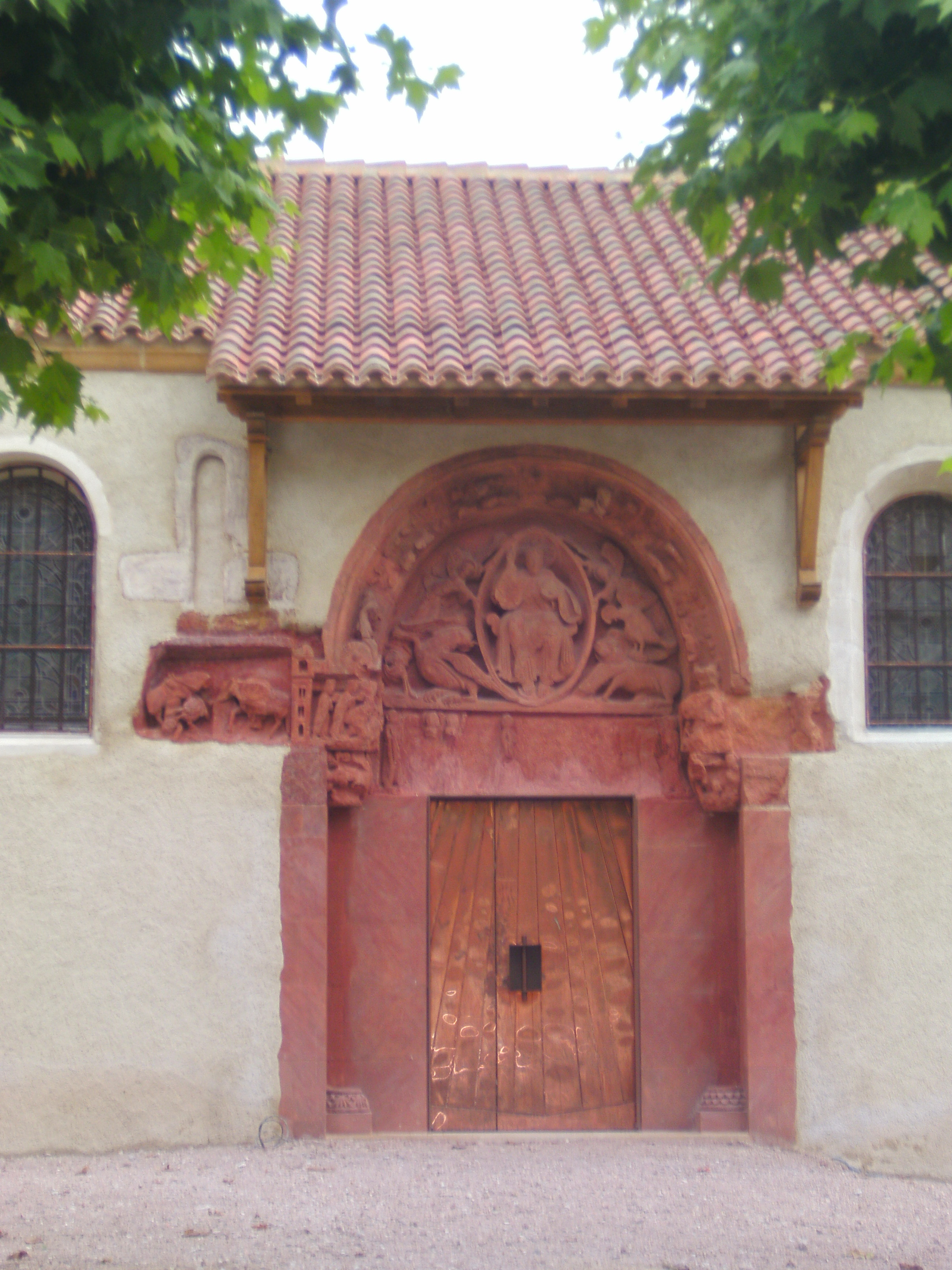 Tympan roman XIIème siècle